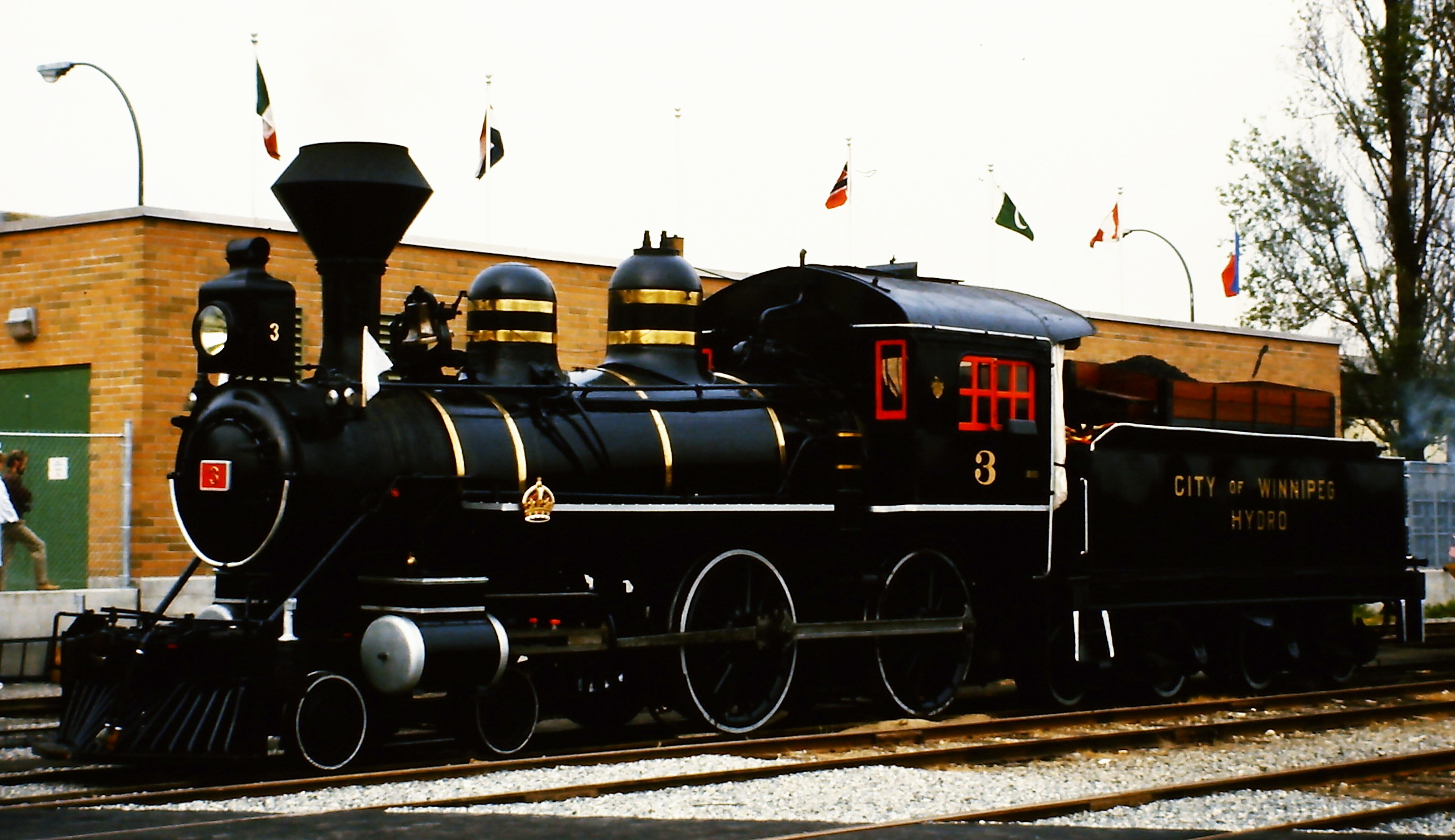 Dampflokomotive Nr. 3 City of Winnipeg der Prairie Dog Railway auf der SteamExpo 86 in Vancouver